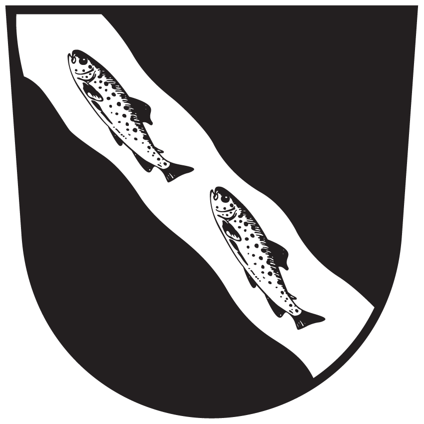 Wappen von Eisenkappel-Vellach